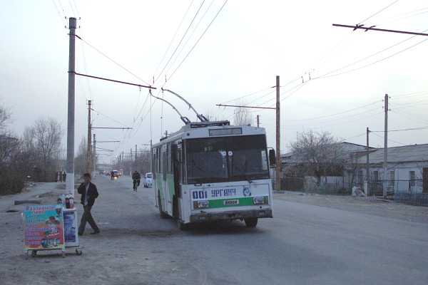 Škoda 14Tr 001 in Urganch